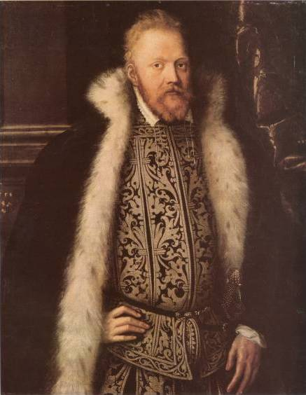 Vratislav z Pernstejna